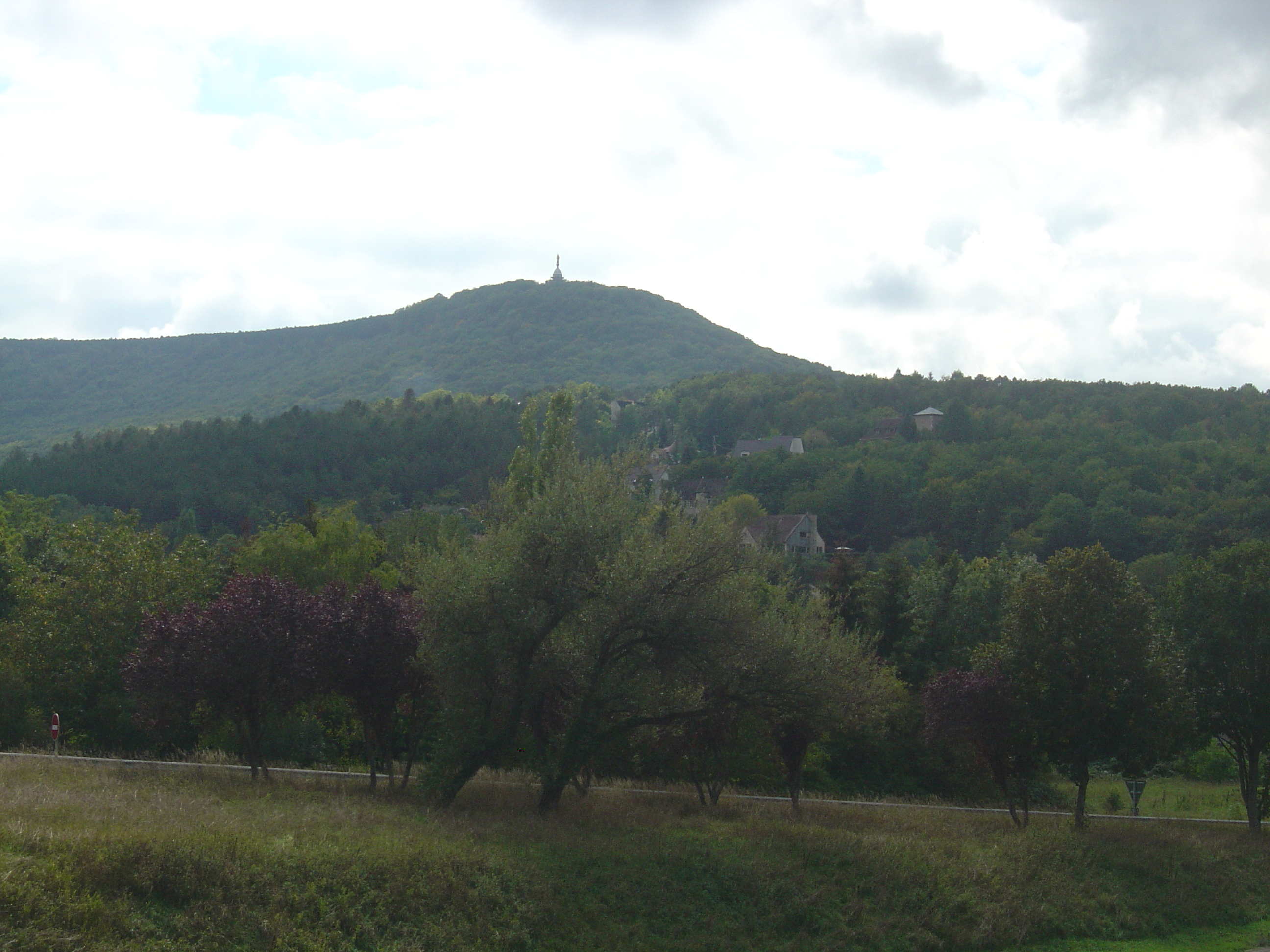 La chapelle Notre-Dame d'Etang vue depuis Vélars-sur-Ouche